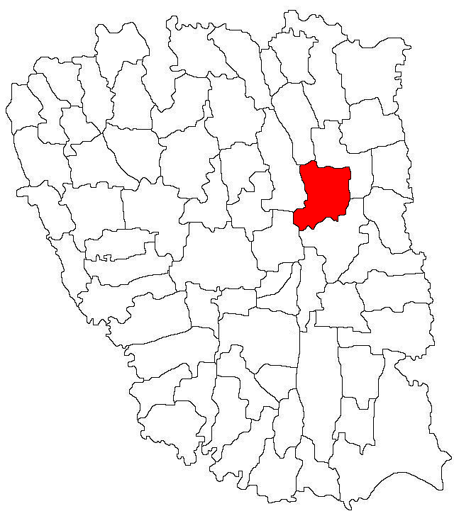 Categorie:Hărţi ale judeţului Galaţi